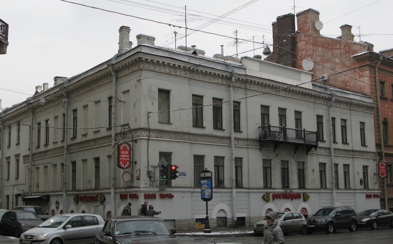 Вид на дом по адресу Миллионная, 21 с перекрестка Миллионной ул. и Мошкова пер. , 21 Built: Approved: Распоряжение Совета Министров РСФСР № 3029-р, прил. 3 от 10.07.1962